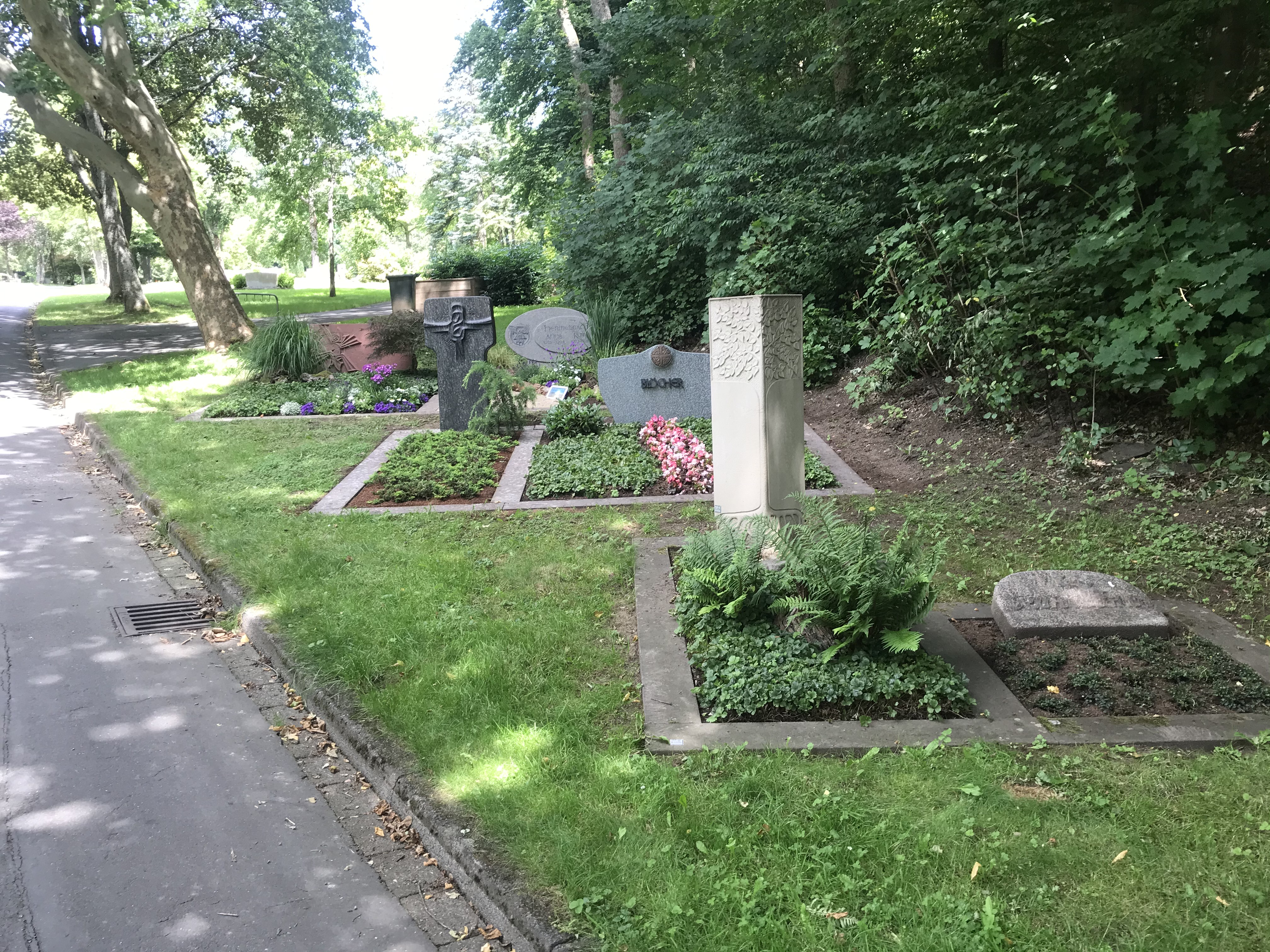 Die Anlage als ganzes Bild